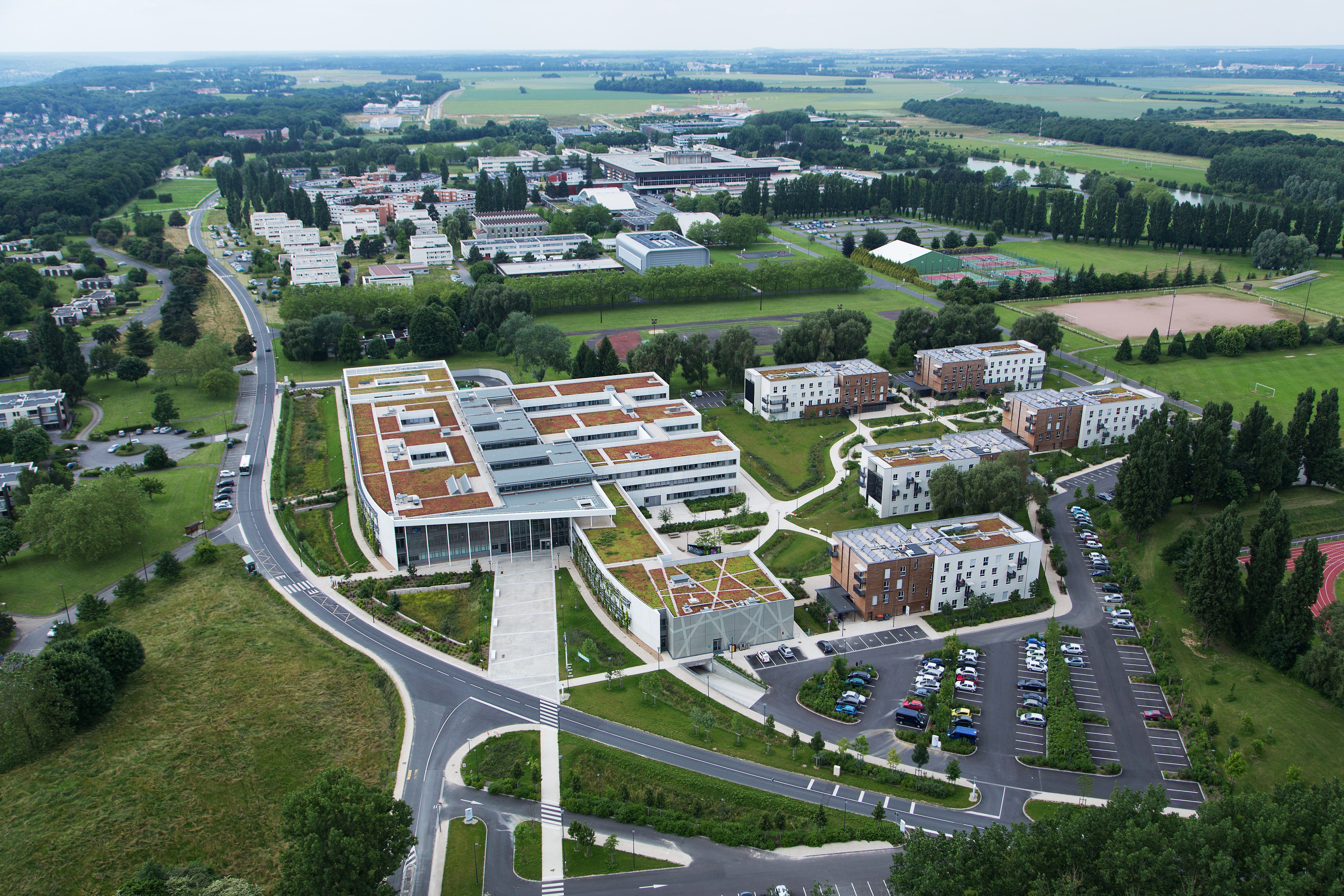 Vue aérienne du campus de l'Ecole polytechnique.